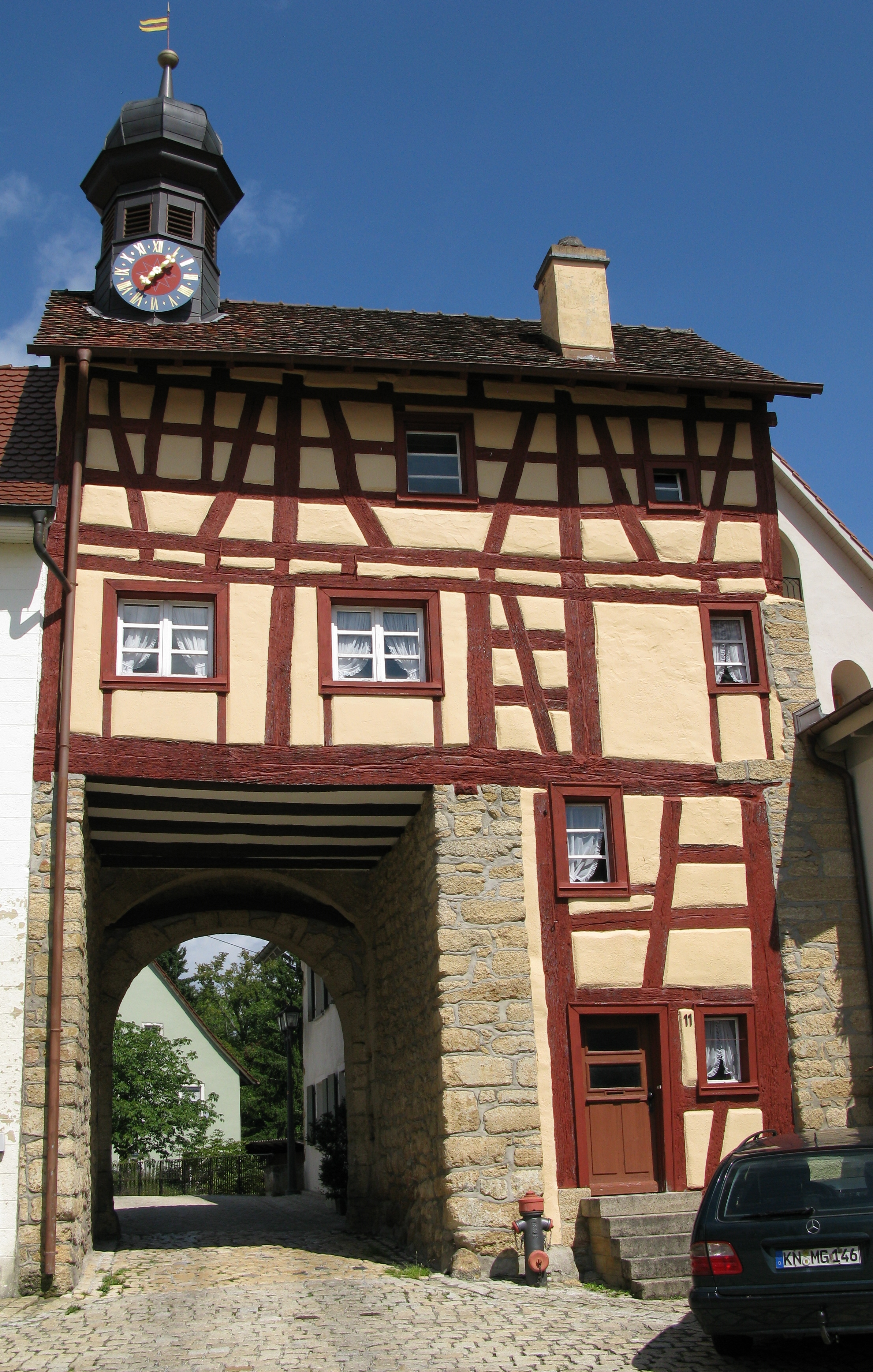 Das Stadttor der Mitte des 13.Jhr. auf dem vorderen Bergsporn gegründeten Stadt Tengen (Hinterburg).